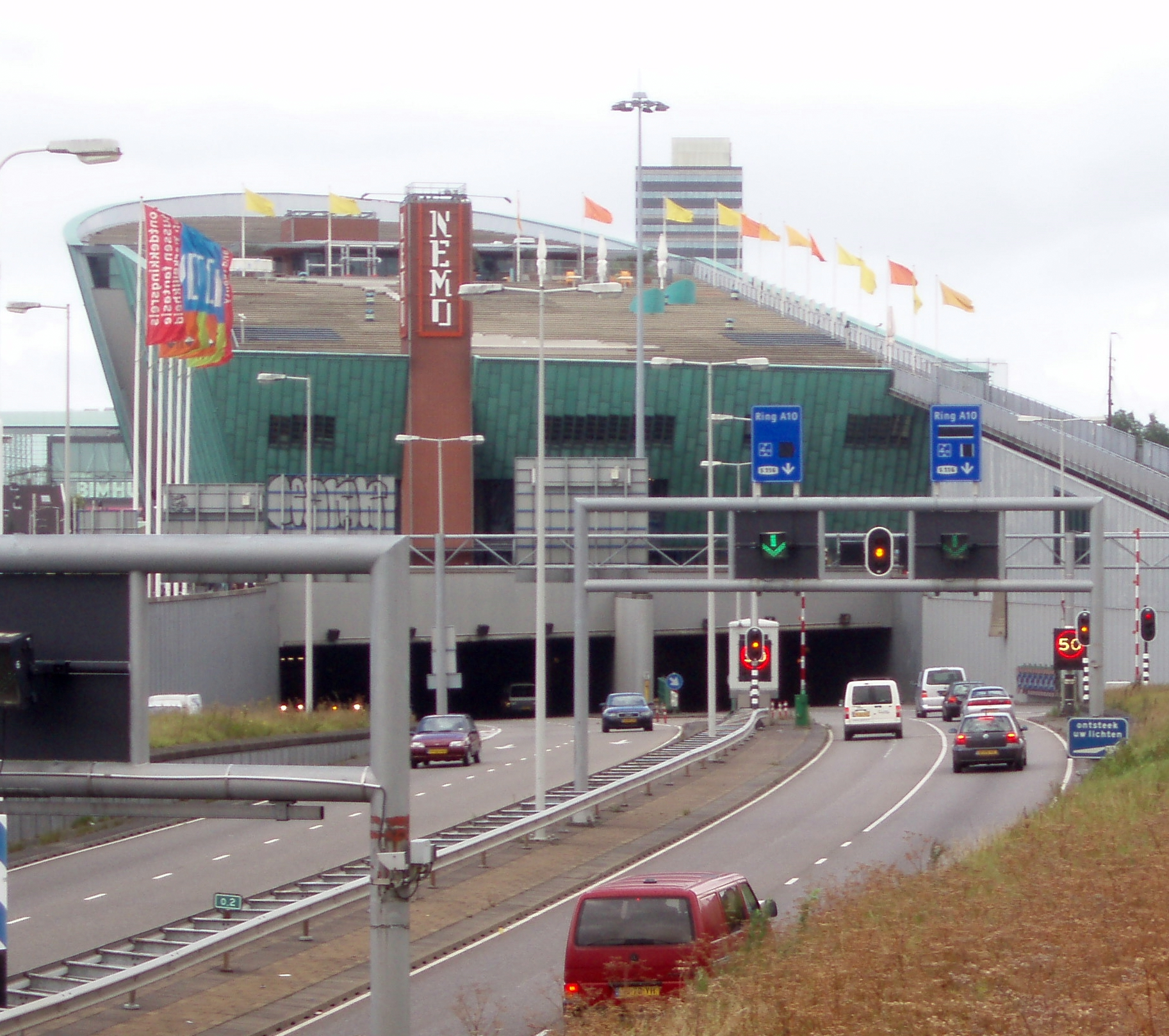 IJtunnel/Nemo